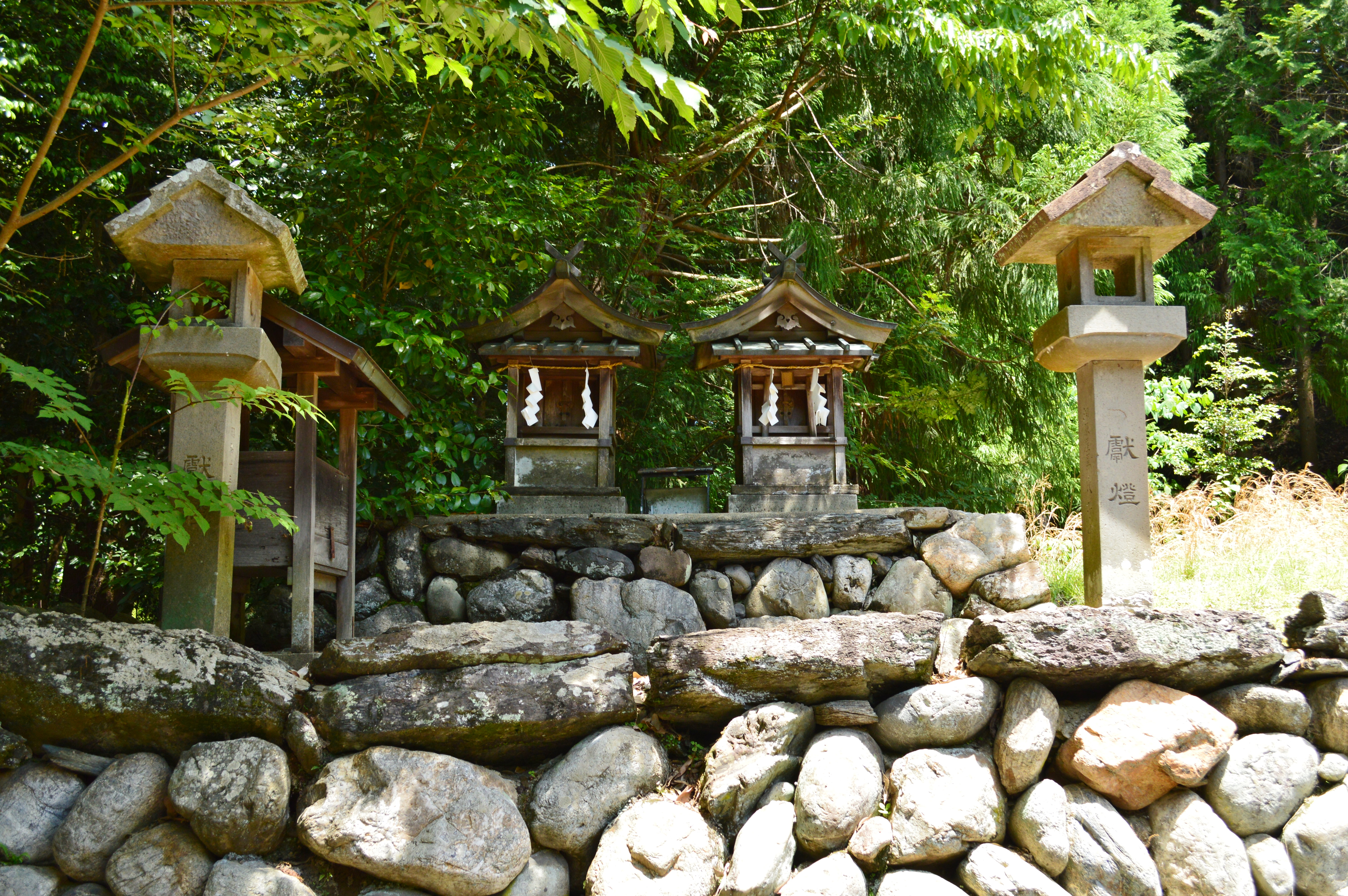 大名持神社 境内社